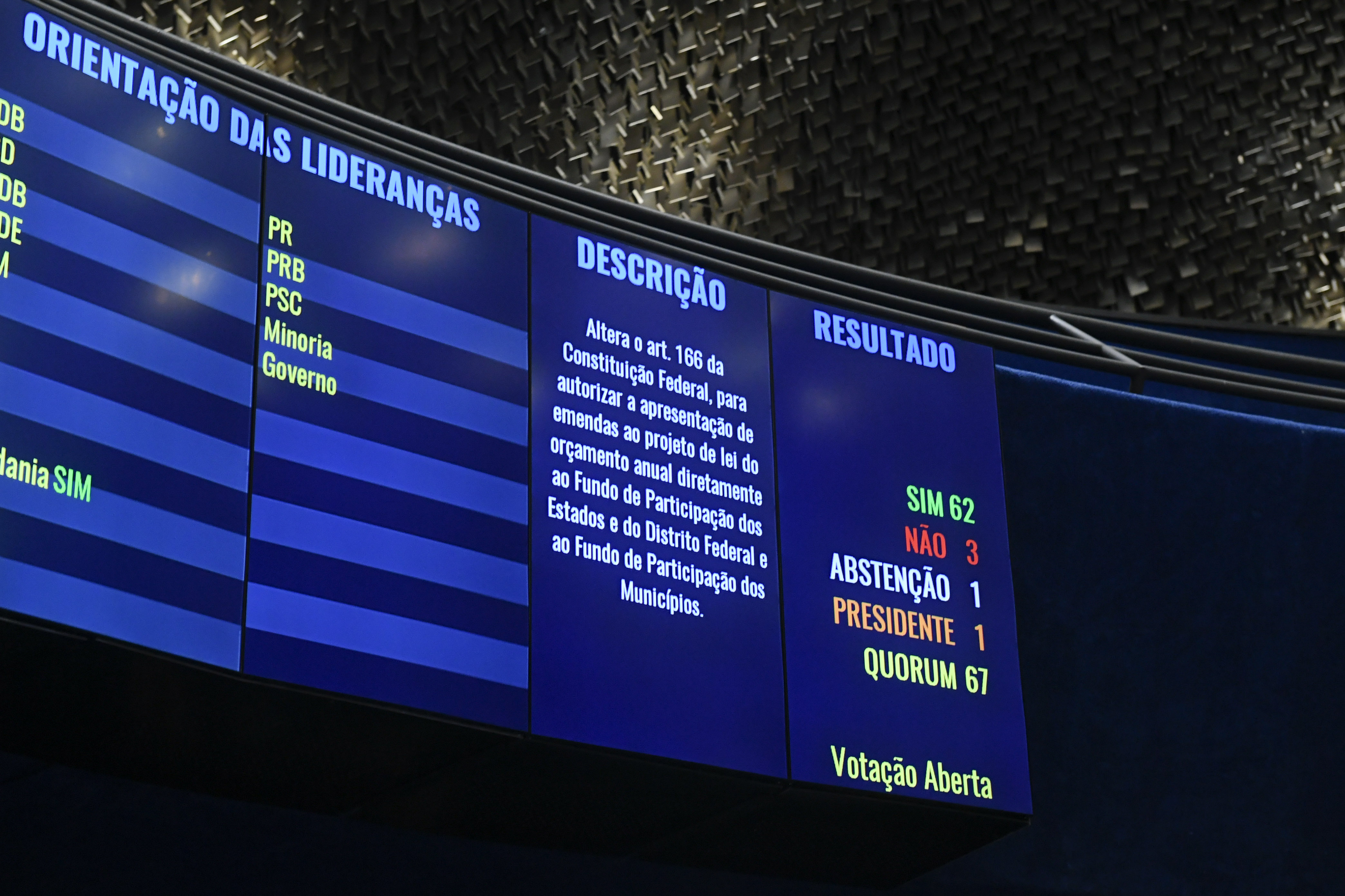 Plenário do Senado Federal durante sessão deliberativa ordinária. Ordem do dia. Painel eletrônico exibe resultado de votação: plenário aprova, em segundo turno, a Proposta de Emenda à Constituição 61/2015, que destina emendas parlamentares diretamente aos fundos de participação de estados e municípios. A matéria segue para a Câmara. Foto: Roque de Sá/Agência Senado